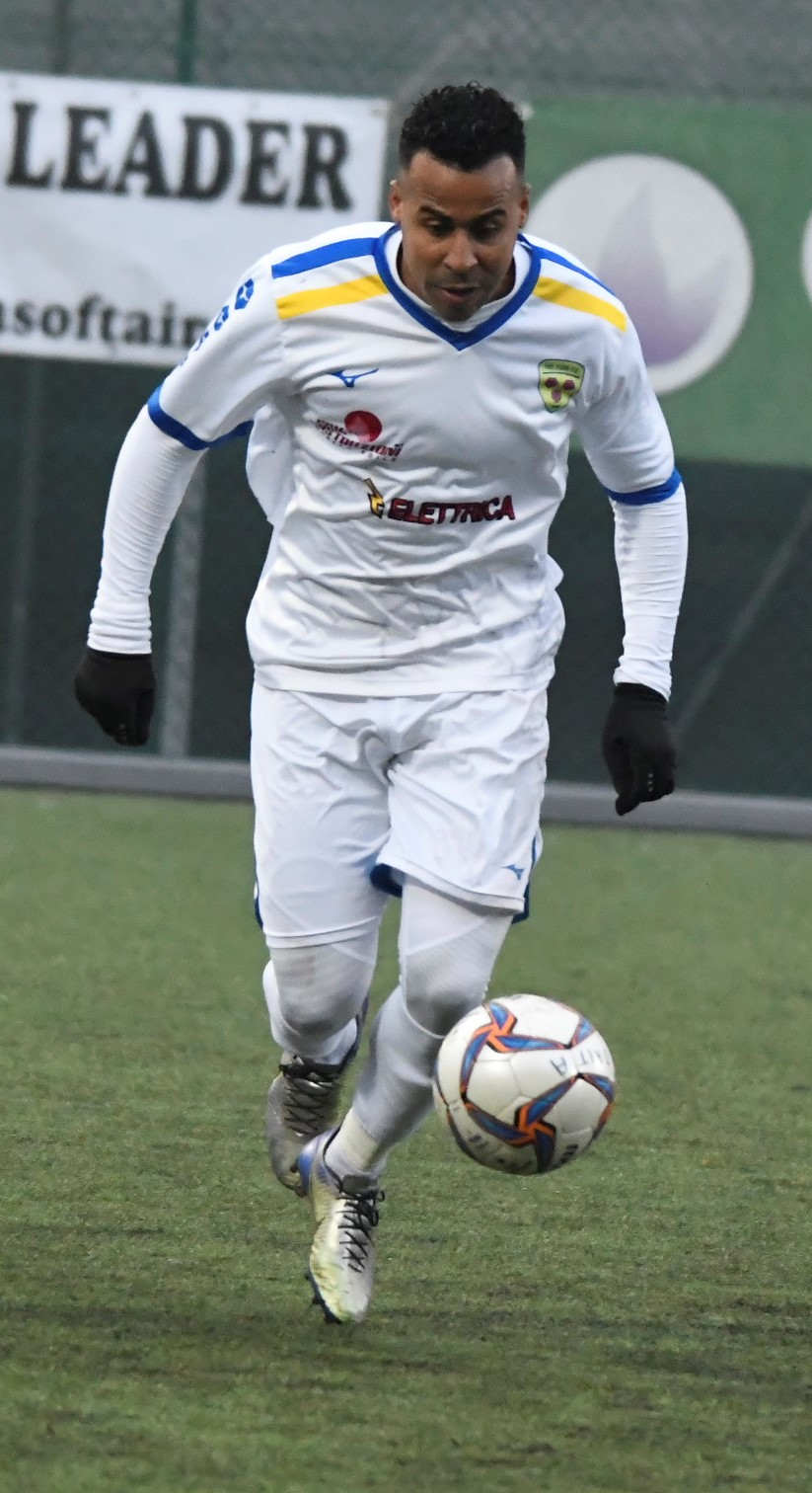 Joel Apezteguía nel Tre Fiori contro La Fiorita 2019